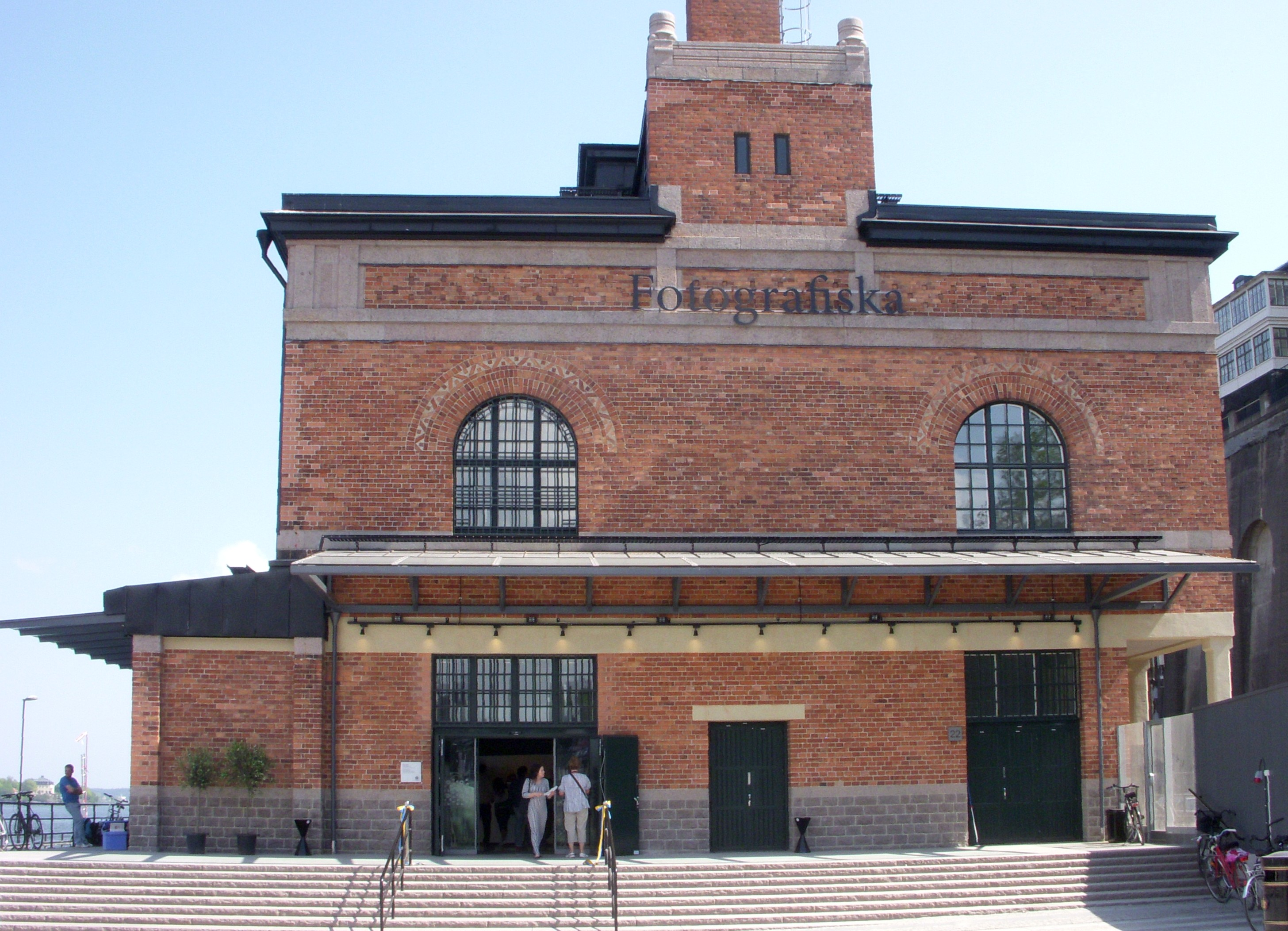 Fotografiska i Stockholm